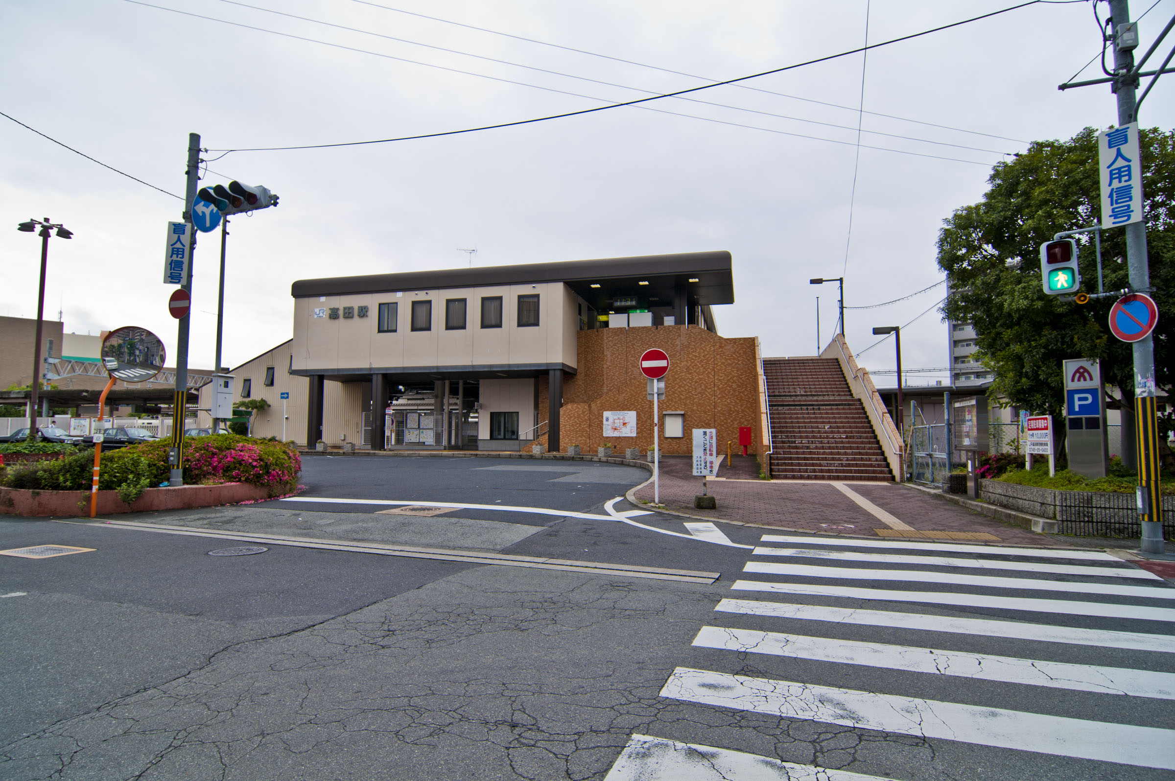 西日本旅客鉄道和歌山線、万葉まほろば線（桜井線）高田駅